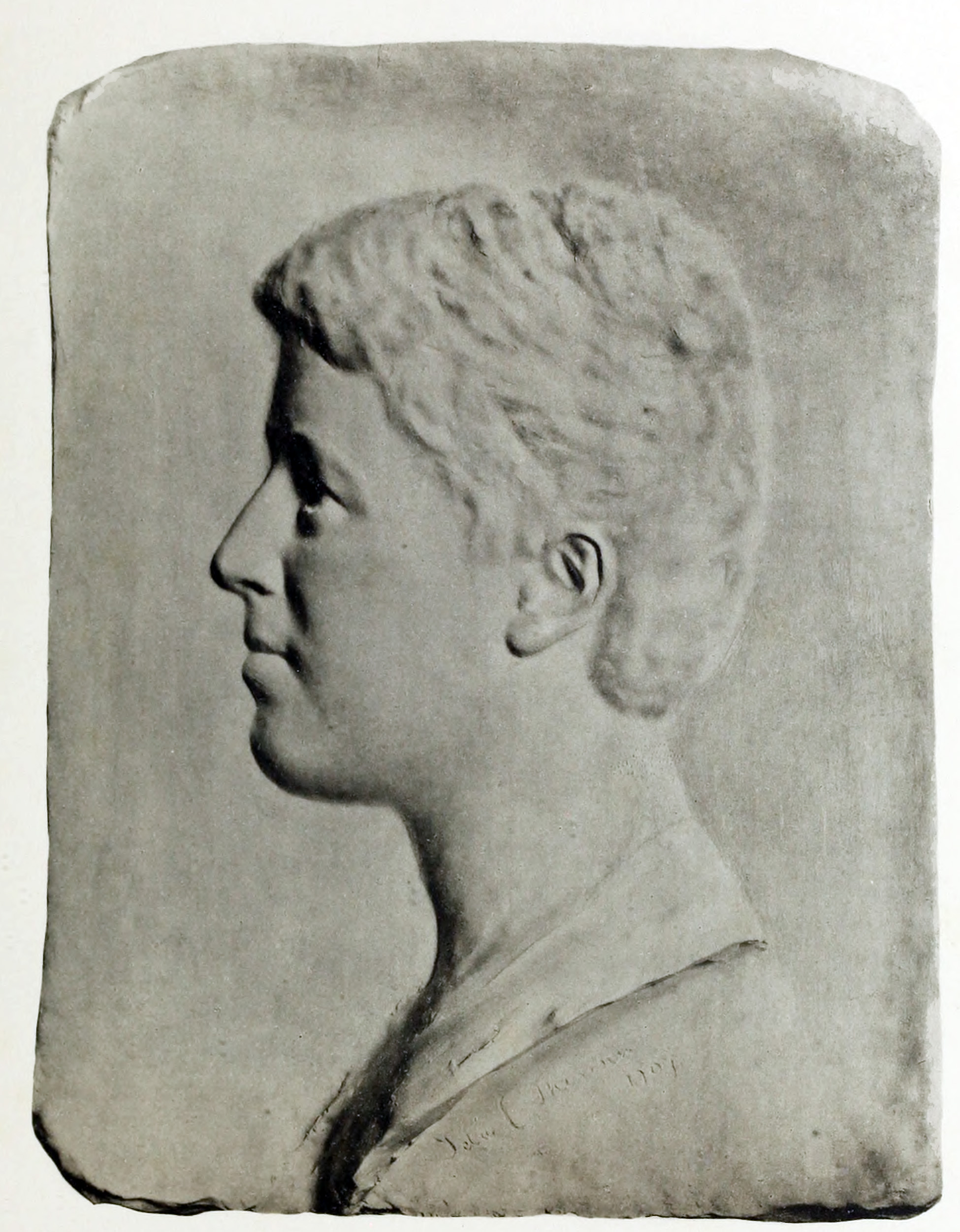 Ellen Sandelin (1862-1907)